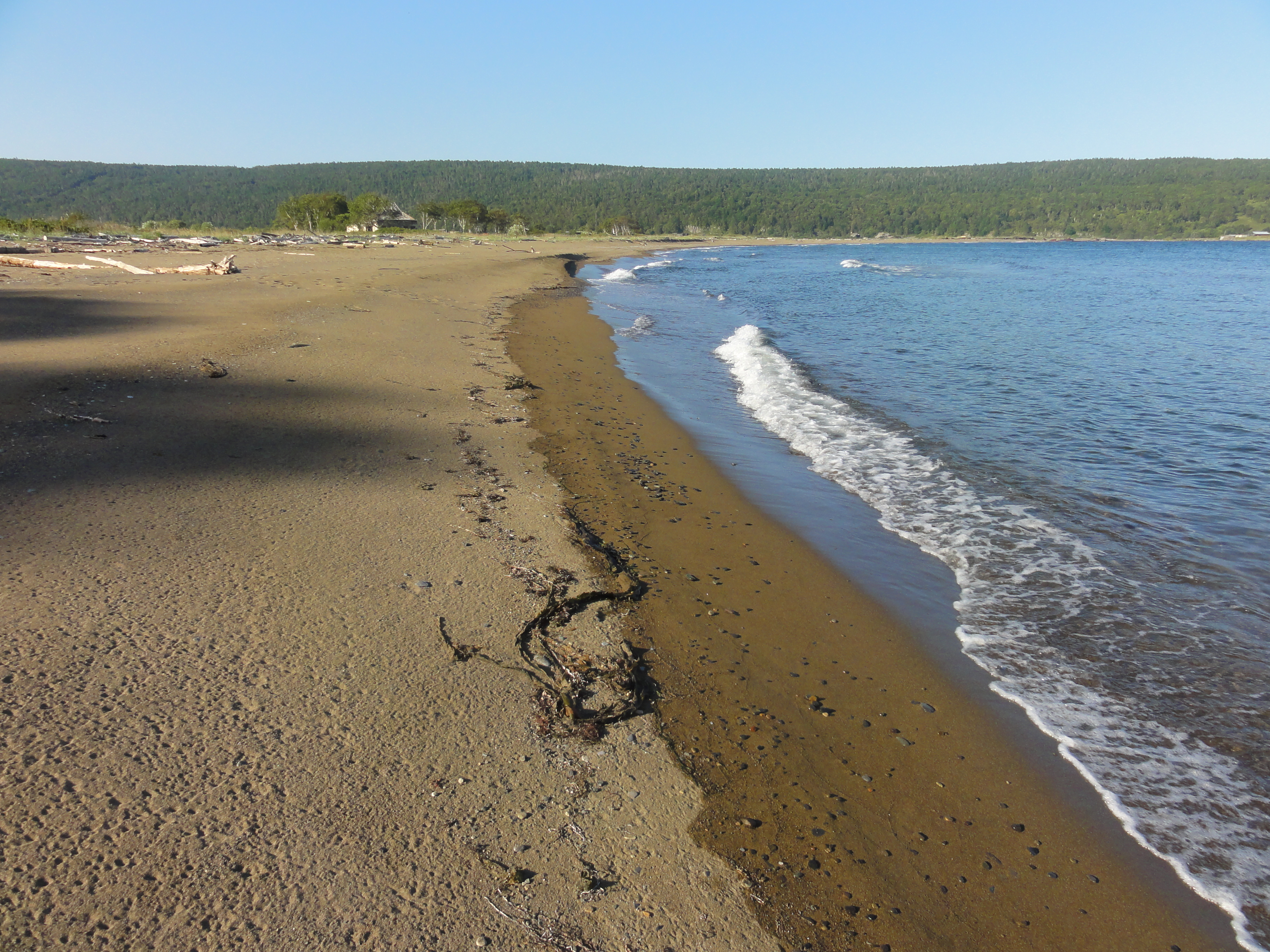 Нельминский пляж